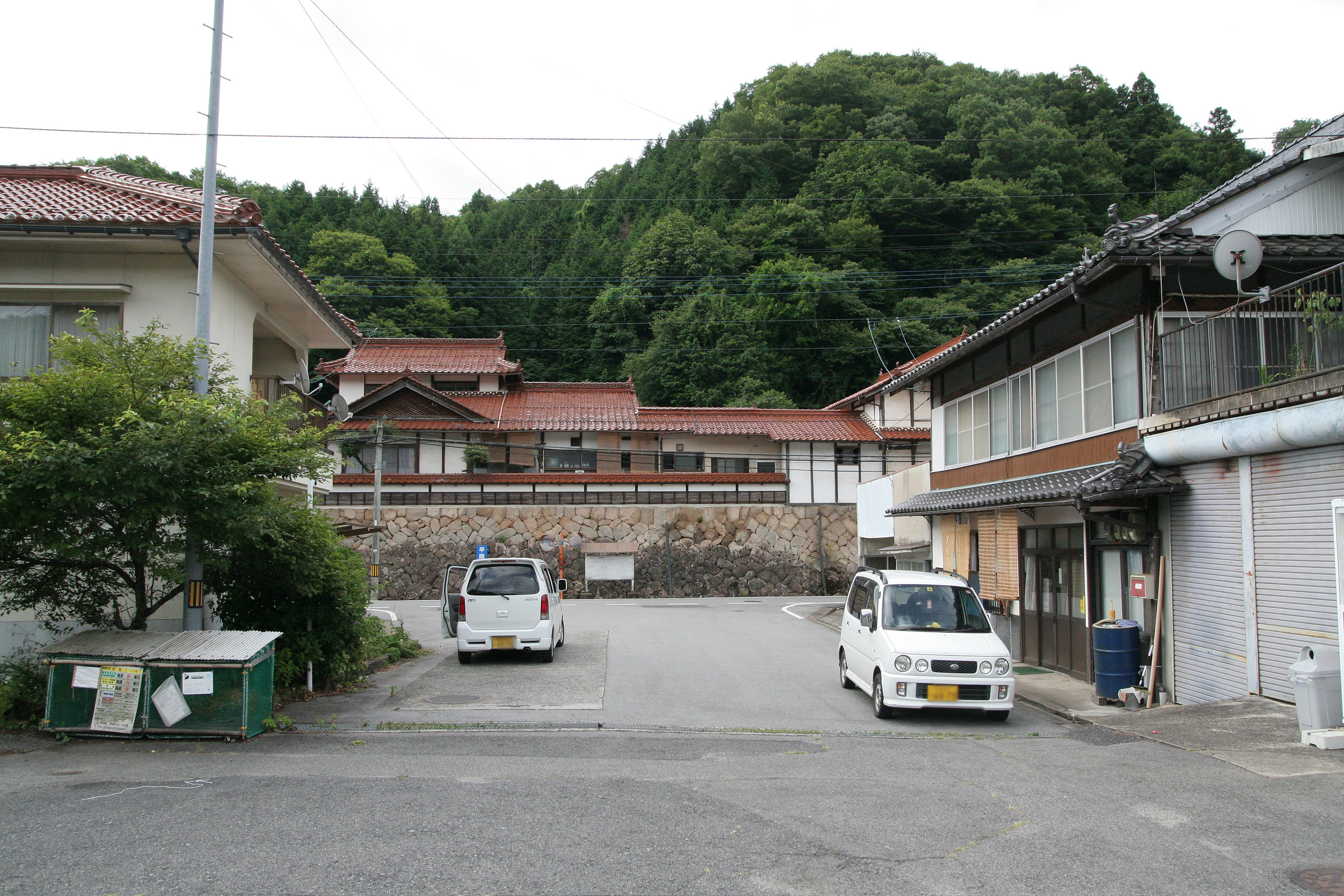 JR西日本 福塩線 備後安田駅の駅前